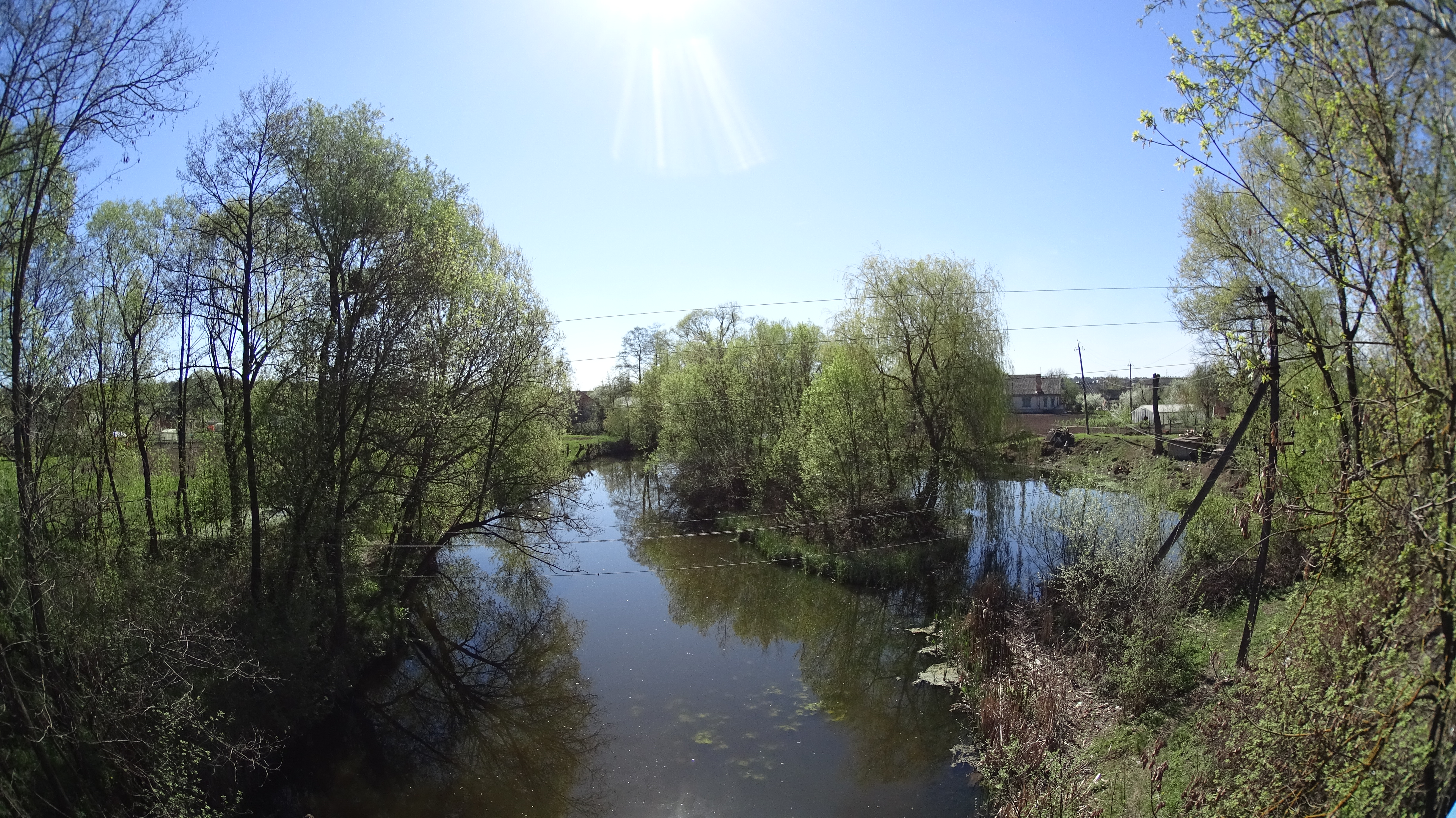 Буго-Деснянський, Вінницький район, Михайлівське лісництво, кв. 15-34, Стрижавська с/р — кв. 15, 17-21, 25, 26 = 424,0 га. Сосонська с/р, кв. 16, 22-24 = 198,0 га. Стадницька с/р — кв. 27-34 = 431,0 га.